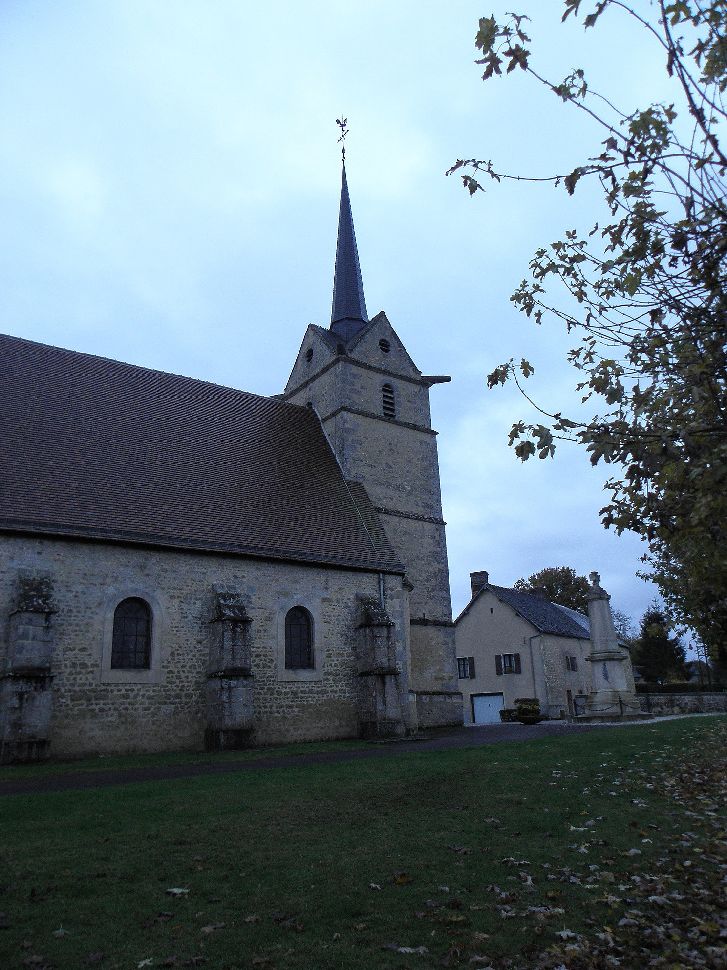 Église Saint-Aubin de Saint-Aubin-d'Appenai (61).